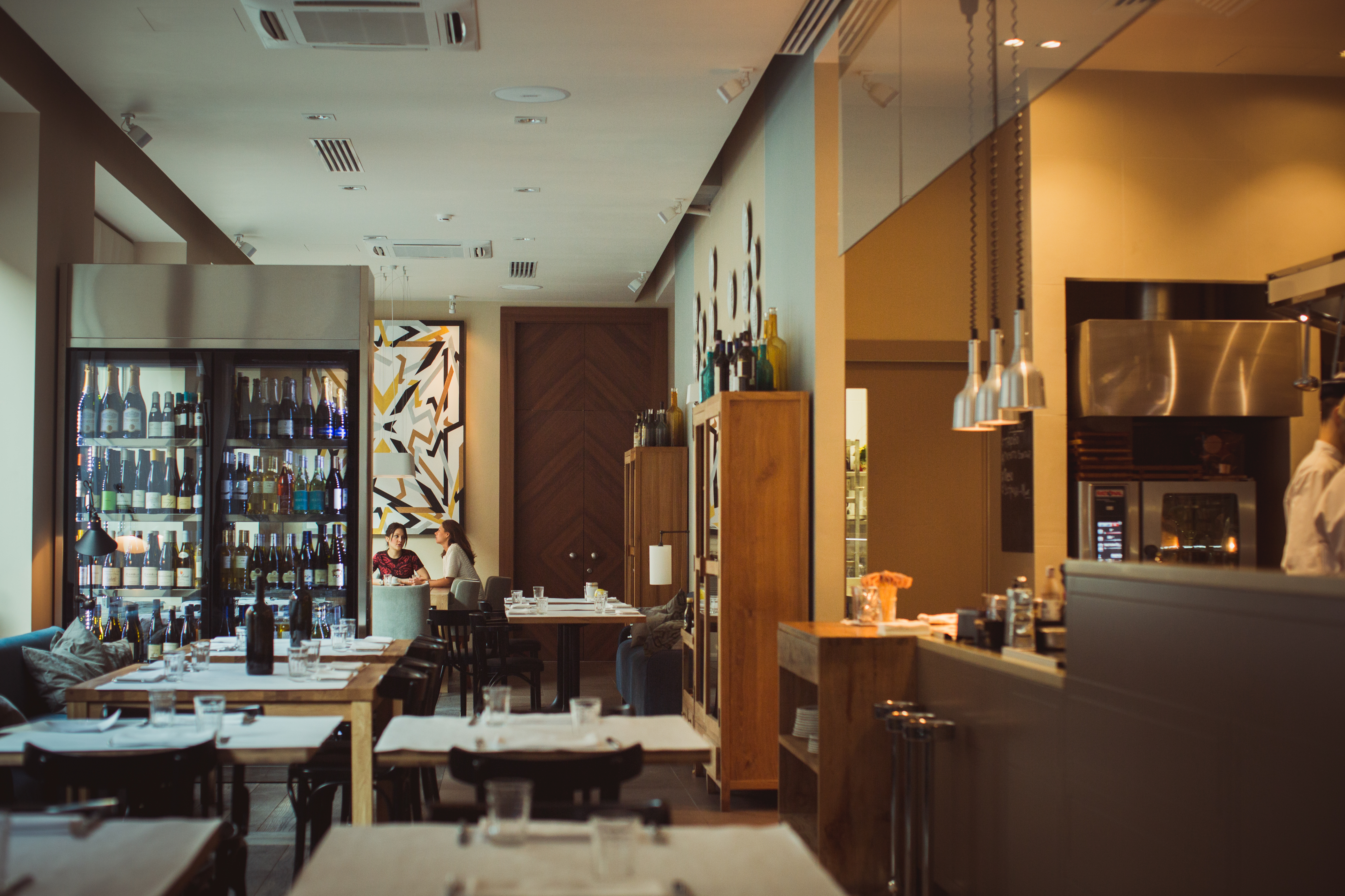 Probka в Петербурге, итальянский ресторан Арама Мнацаканова